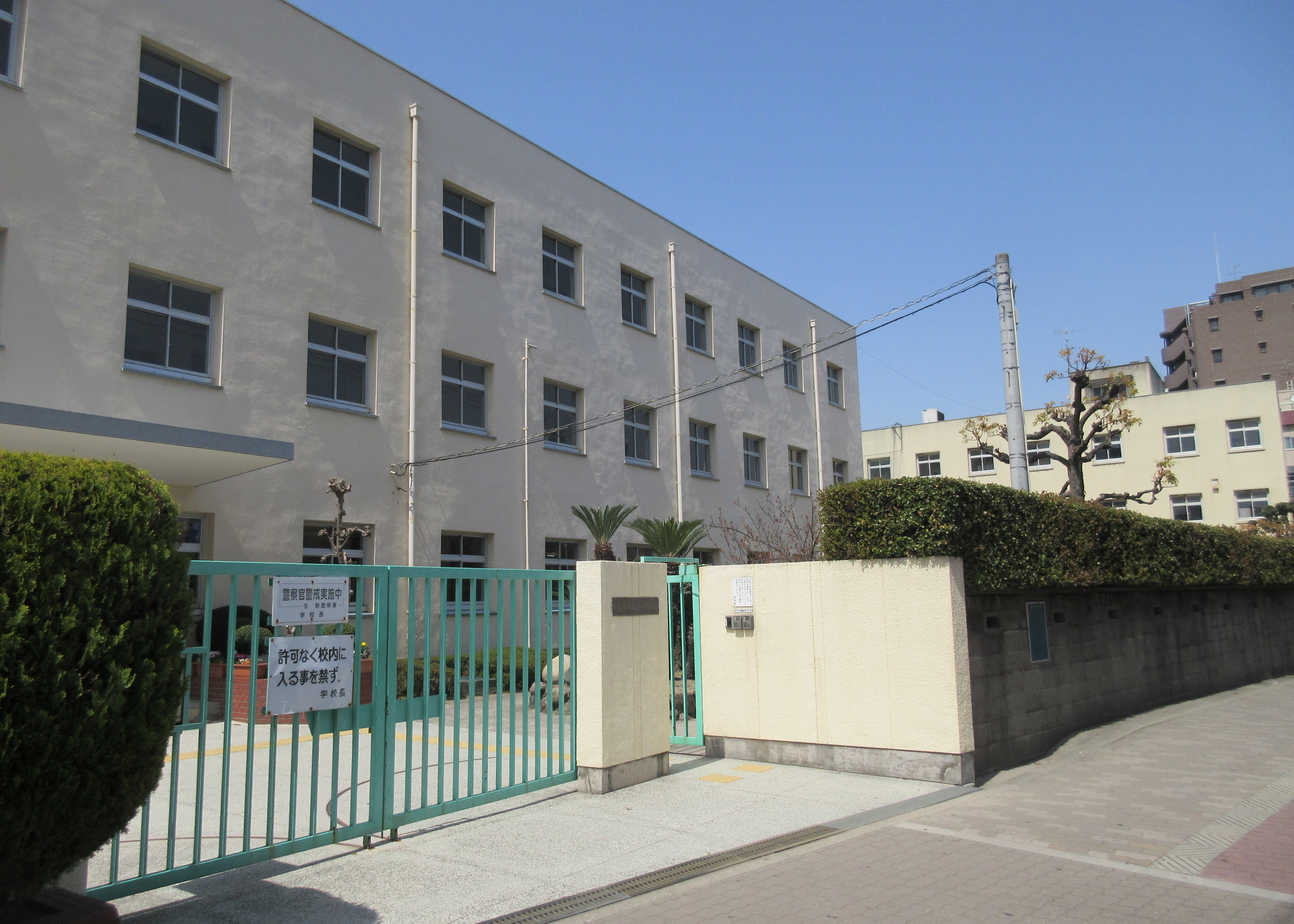 大阪市立巽中学校